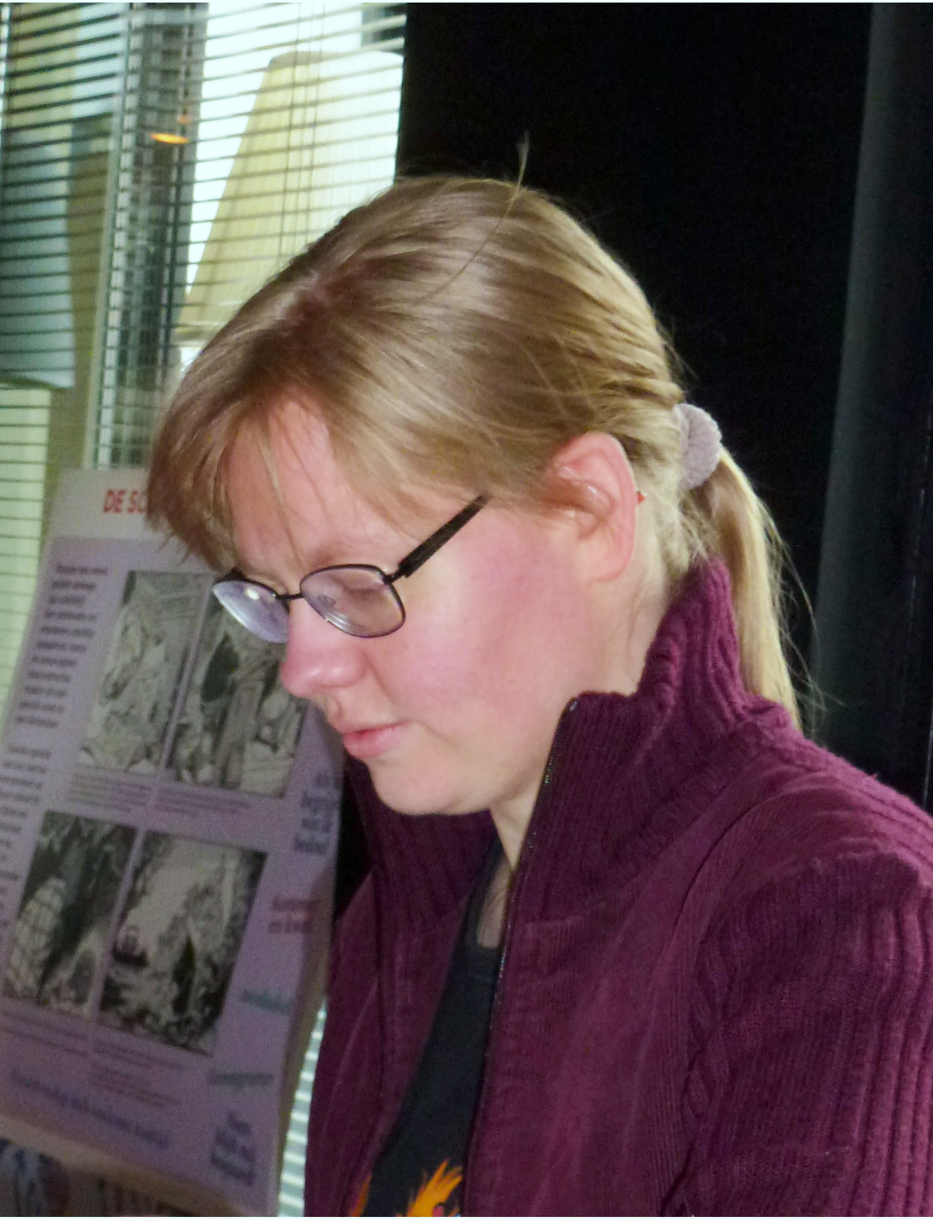 Henrieke Goorhuis Foto genomen tijdens Strips op de Markt (Gouda, 7 mei 2017). De 26-jarige tekenares Henrieke Goorhuis illustreerde in 2016, het eerste nieuwe lange Bommelverhaal dat sinds 30 jaar verschijnt met de titel "Het Lastpak".